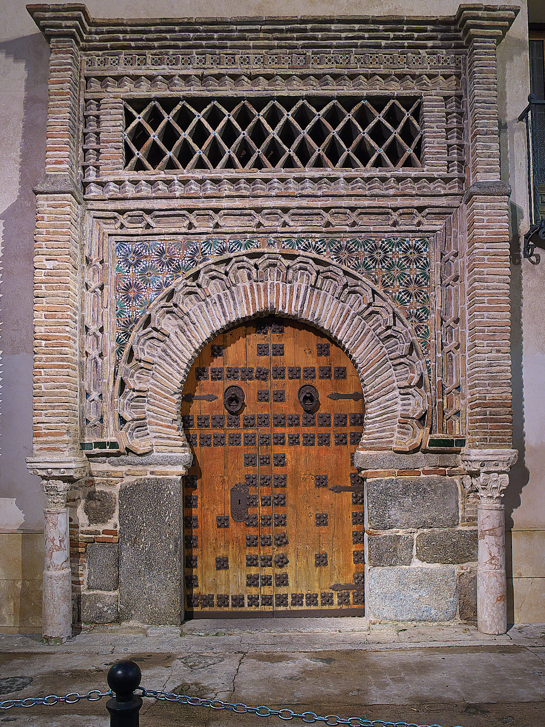 Portada de un palacio con origen en el siglo XV.